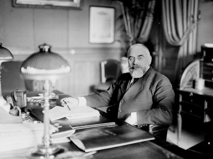 F. RAUX dans son bureau de la Préfecture de police de Paris